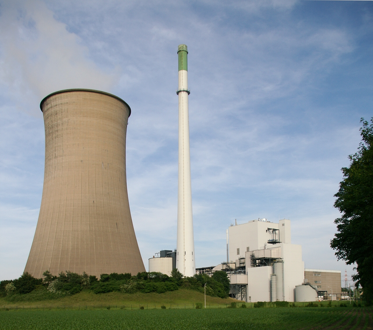 Kraftwerk Gustav Knepper in Dortmund-Mengede, Nordrhein-Westfalen